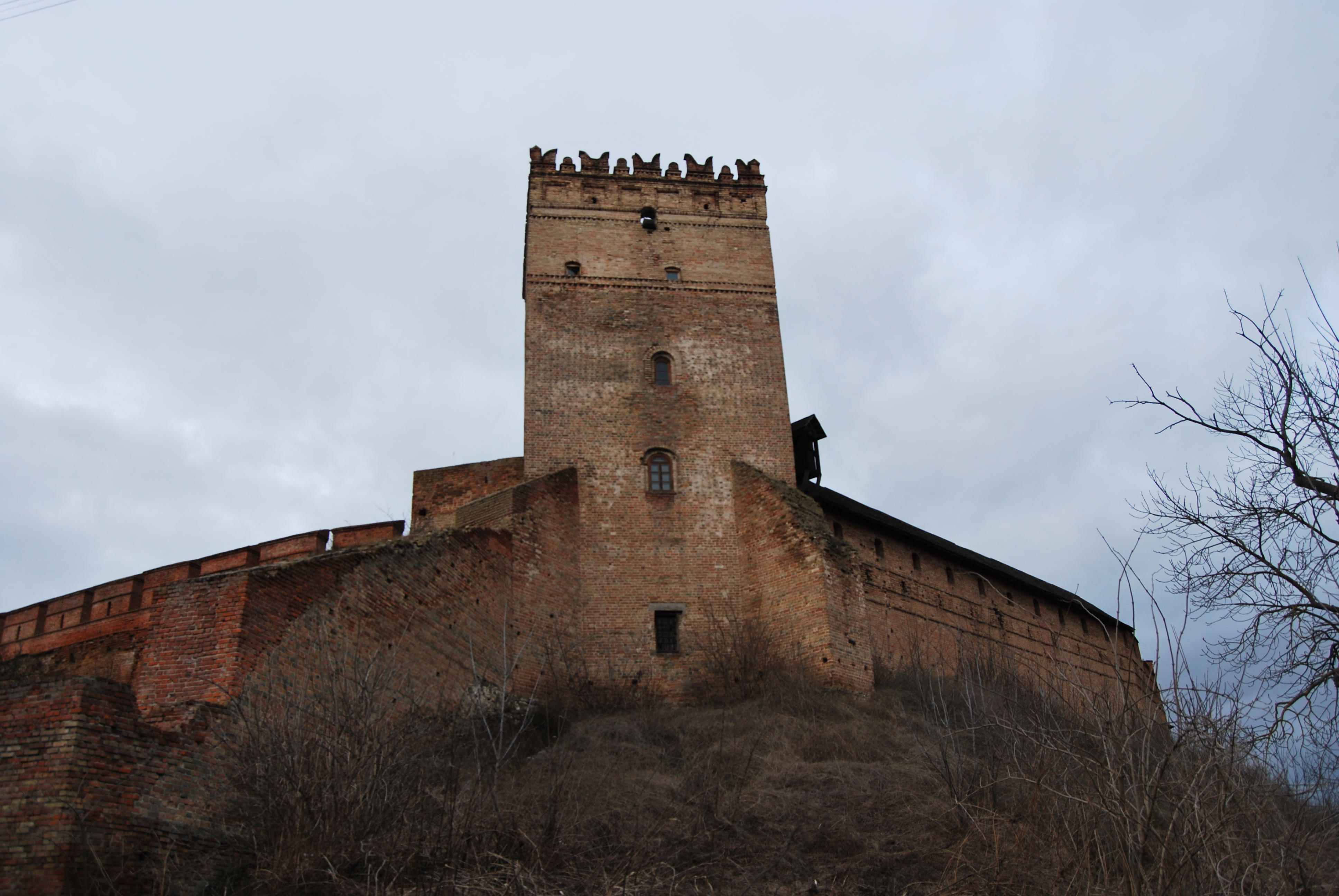 Владича башта (мур.), Луцьк, вул. Кафедральна, 1а